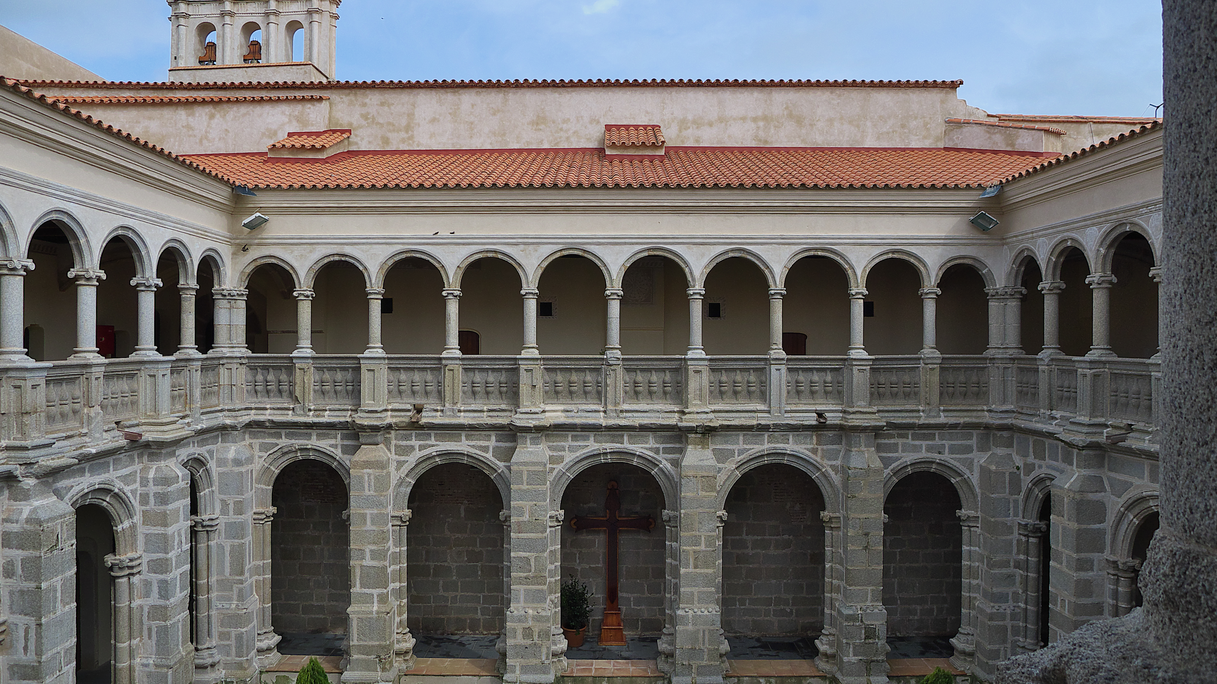 Claustro protorrenacentista datado a finales del s. XV, perteneciente a la casa matriz de la Orden de Santiago.